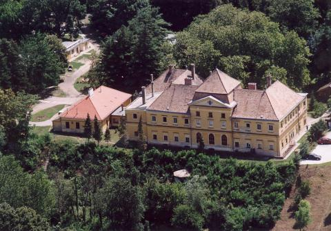 Kastelo de Berzence.